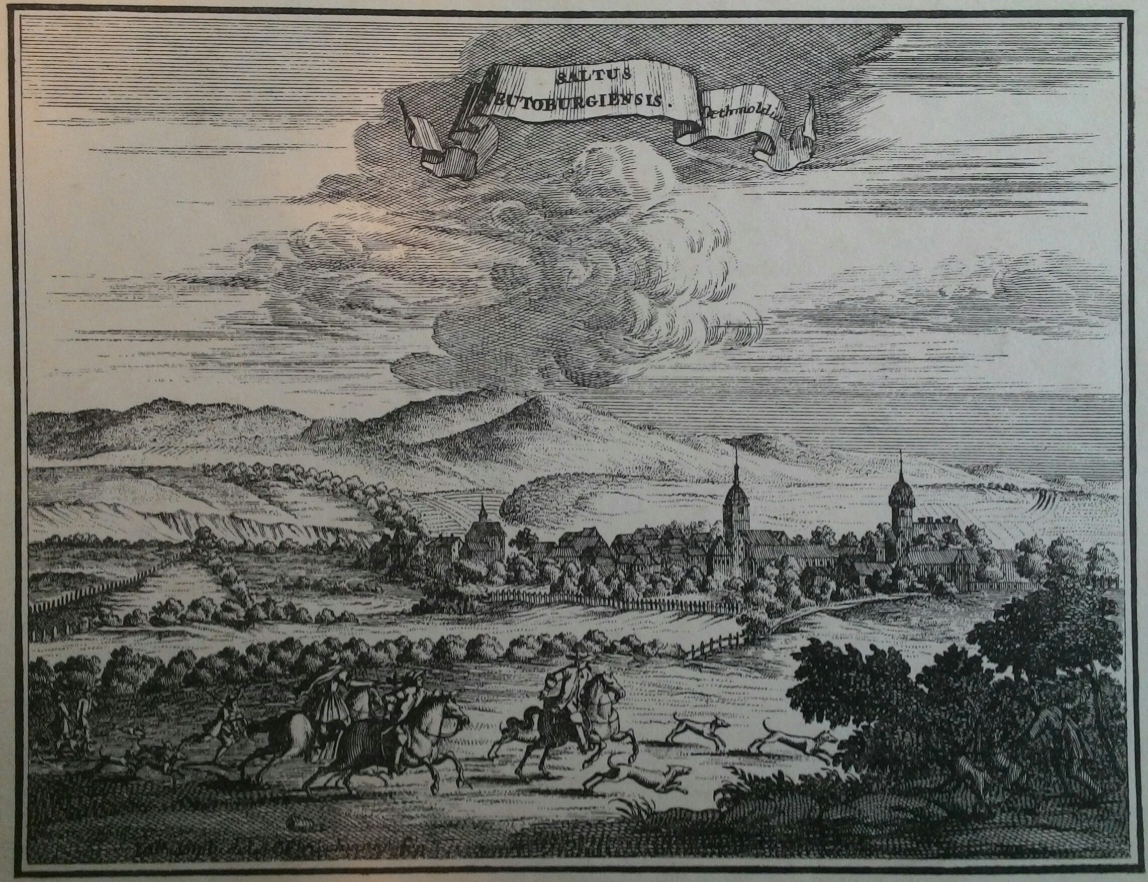 Faksimile nach einer Zeichnung von Detmold um 1670 von Johann Georg Rudolphi mit Blick auf die Grotenburg im Osning